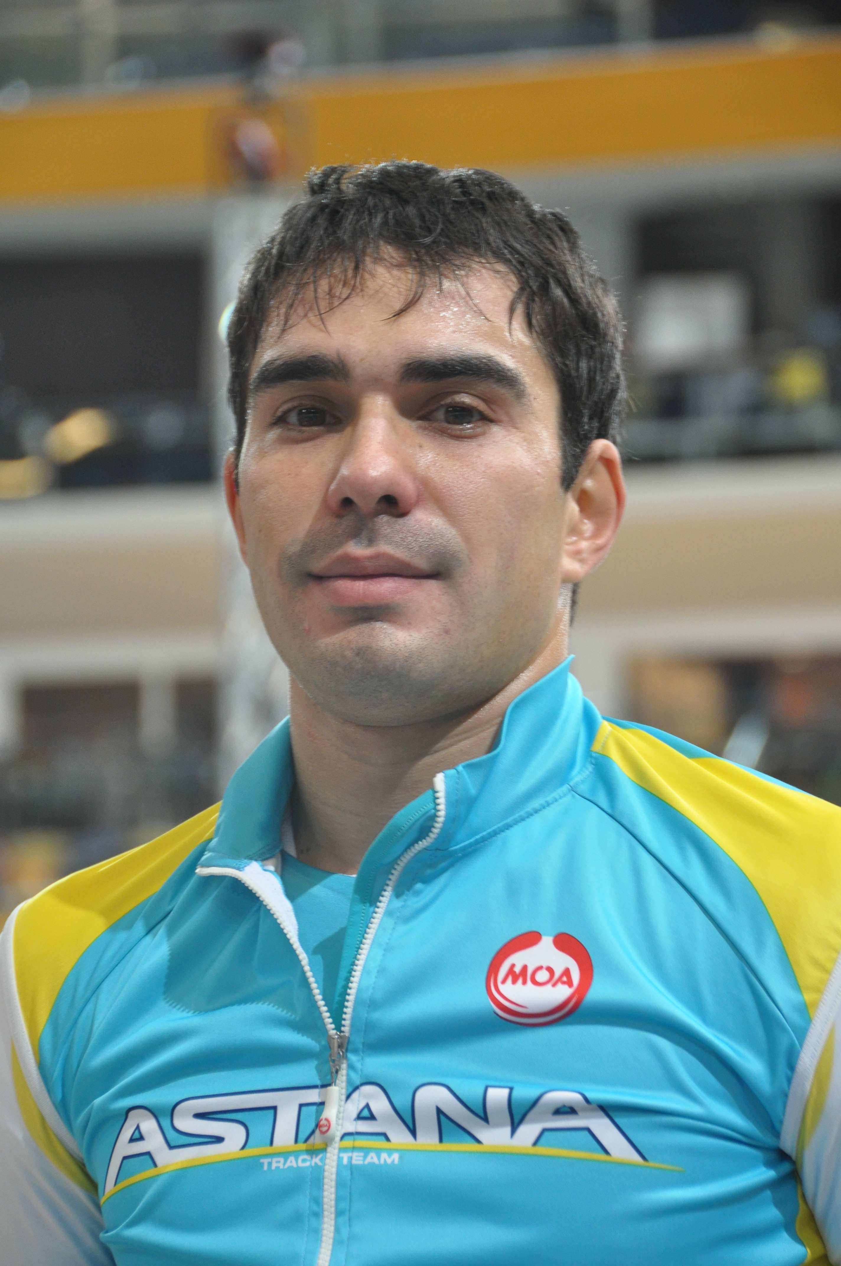 Sultanmurat Miraliyev, kasachischer Radsportler